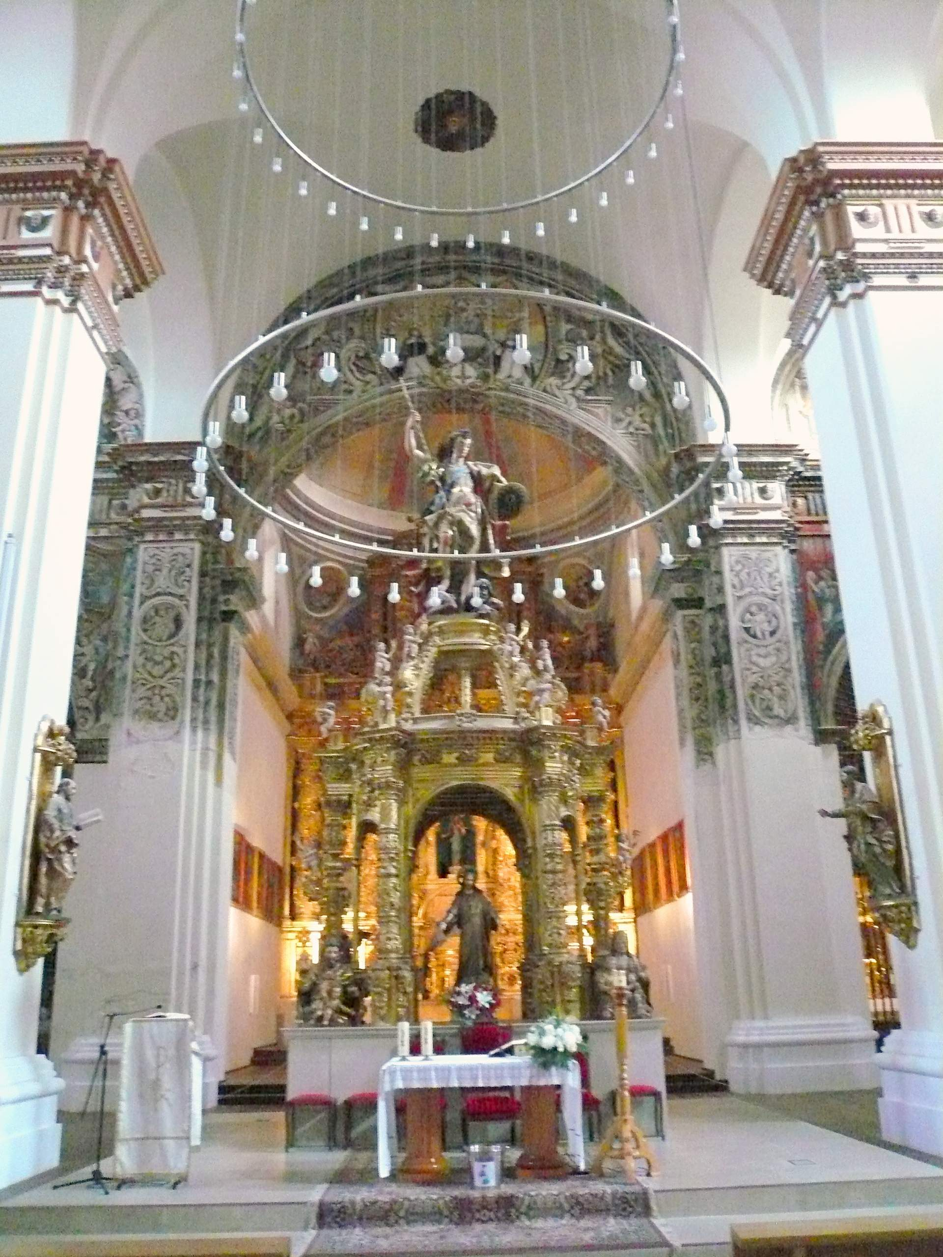 Colegiata de San Miguel (Alfaro, La Rioja)